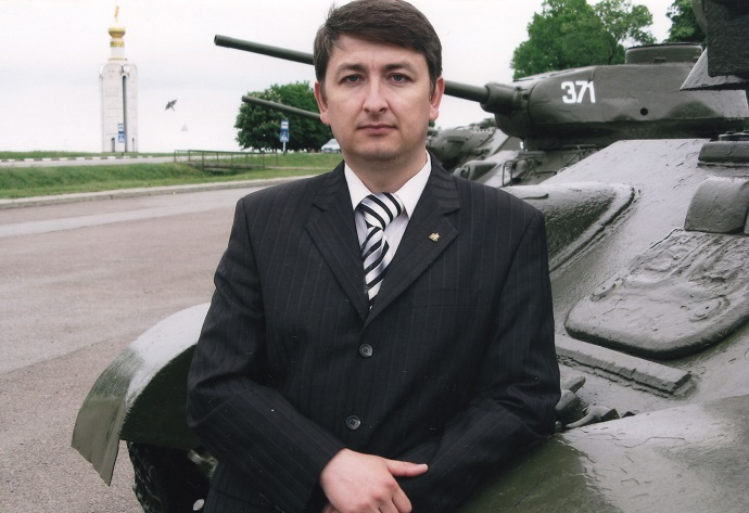 Исследователь Курской битвы В. Н. Замулин.